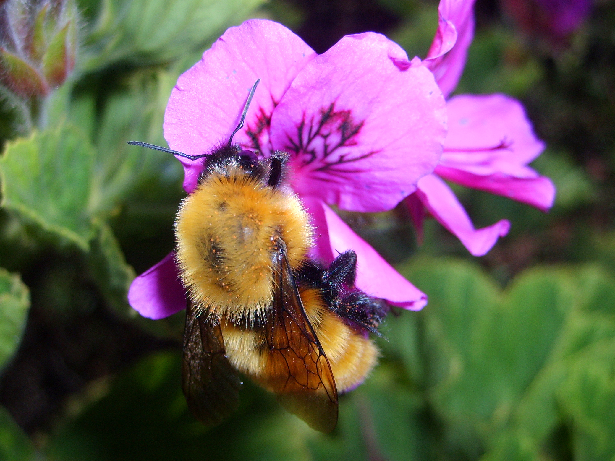 Un abejorro (Bombus) sobre una flor. Imagen tomada en El Quisco, Chile.